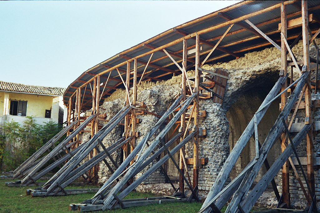 Resti dell'anfiteatro romano